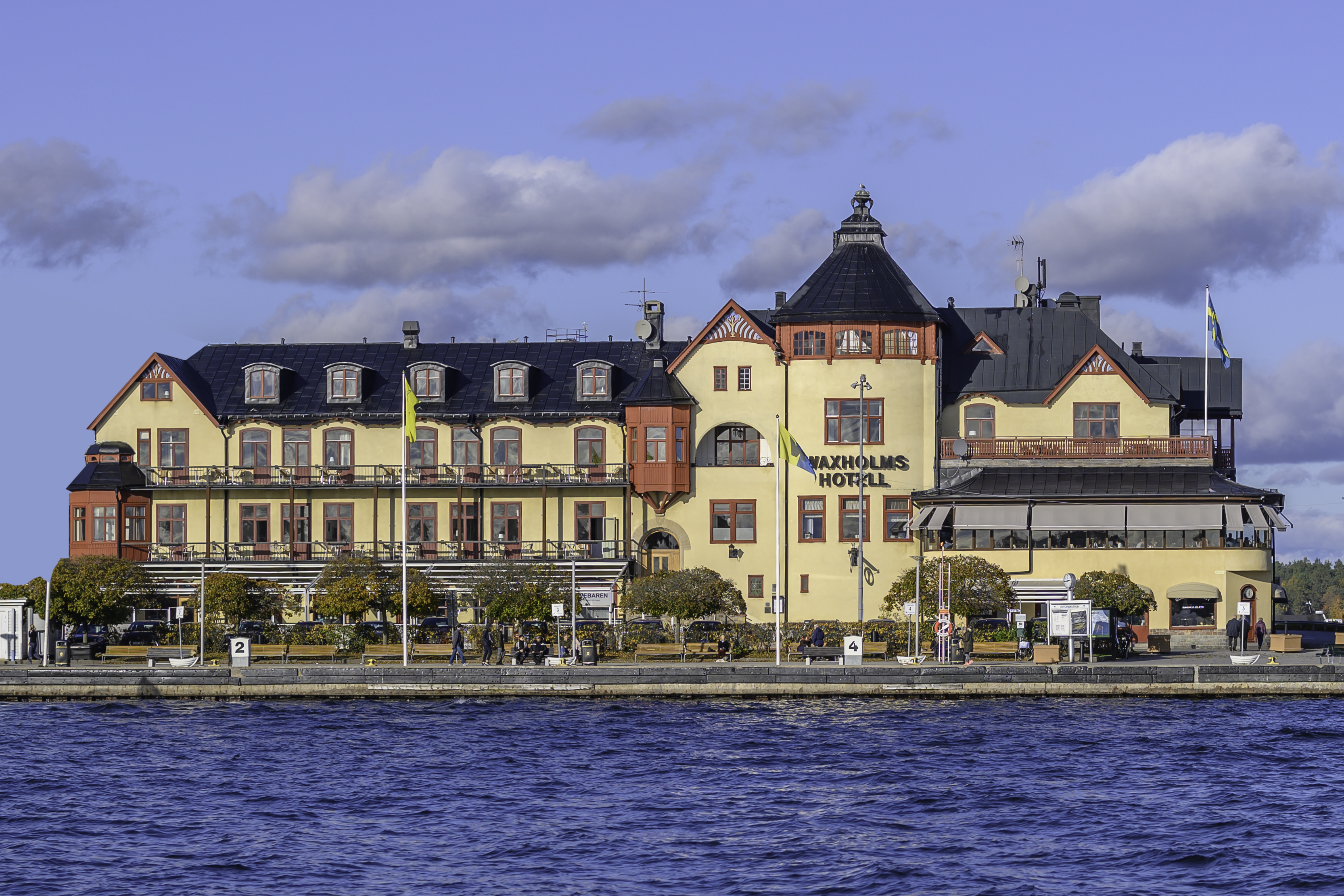 Vaxholm, Stockholm, Sweden, October 2019